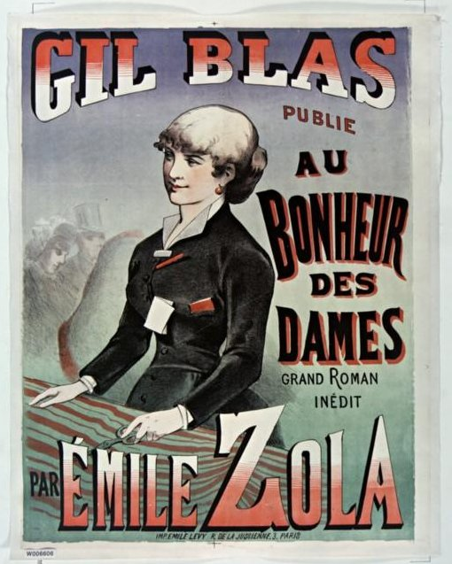 Affiche de Gil Blas pour annoncer la parution de Au Bonheur des Dames (1882)